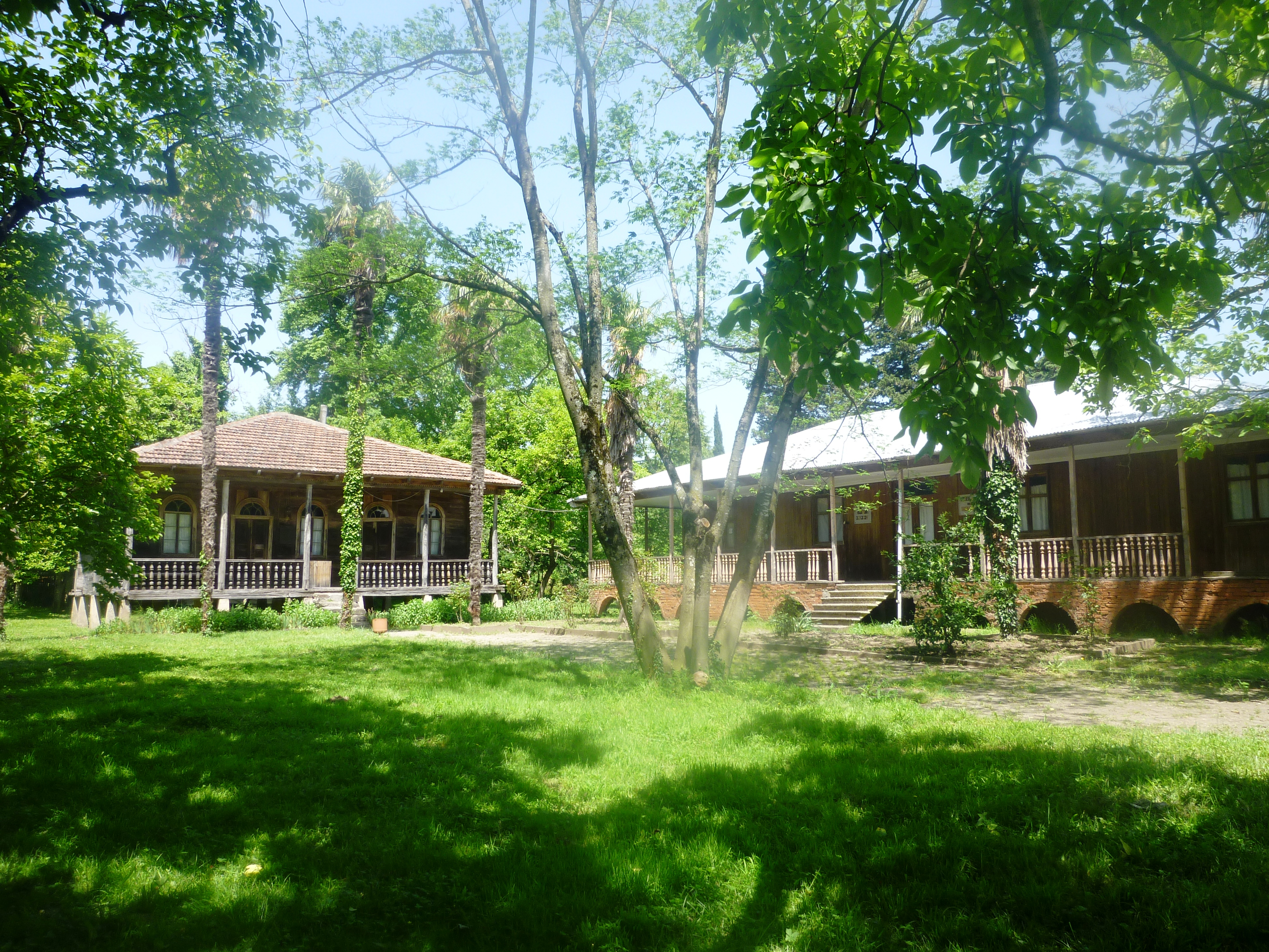 ტიციან ტაბიძის სახლისა და მუზეუმის ხედი